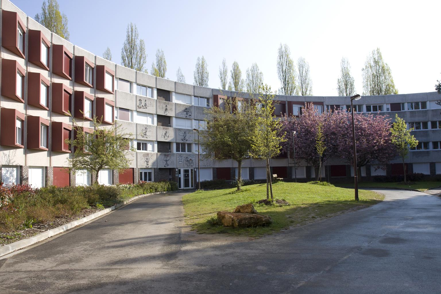 Campus de l'École polytechnique, bâtiment élève (casert).